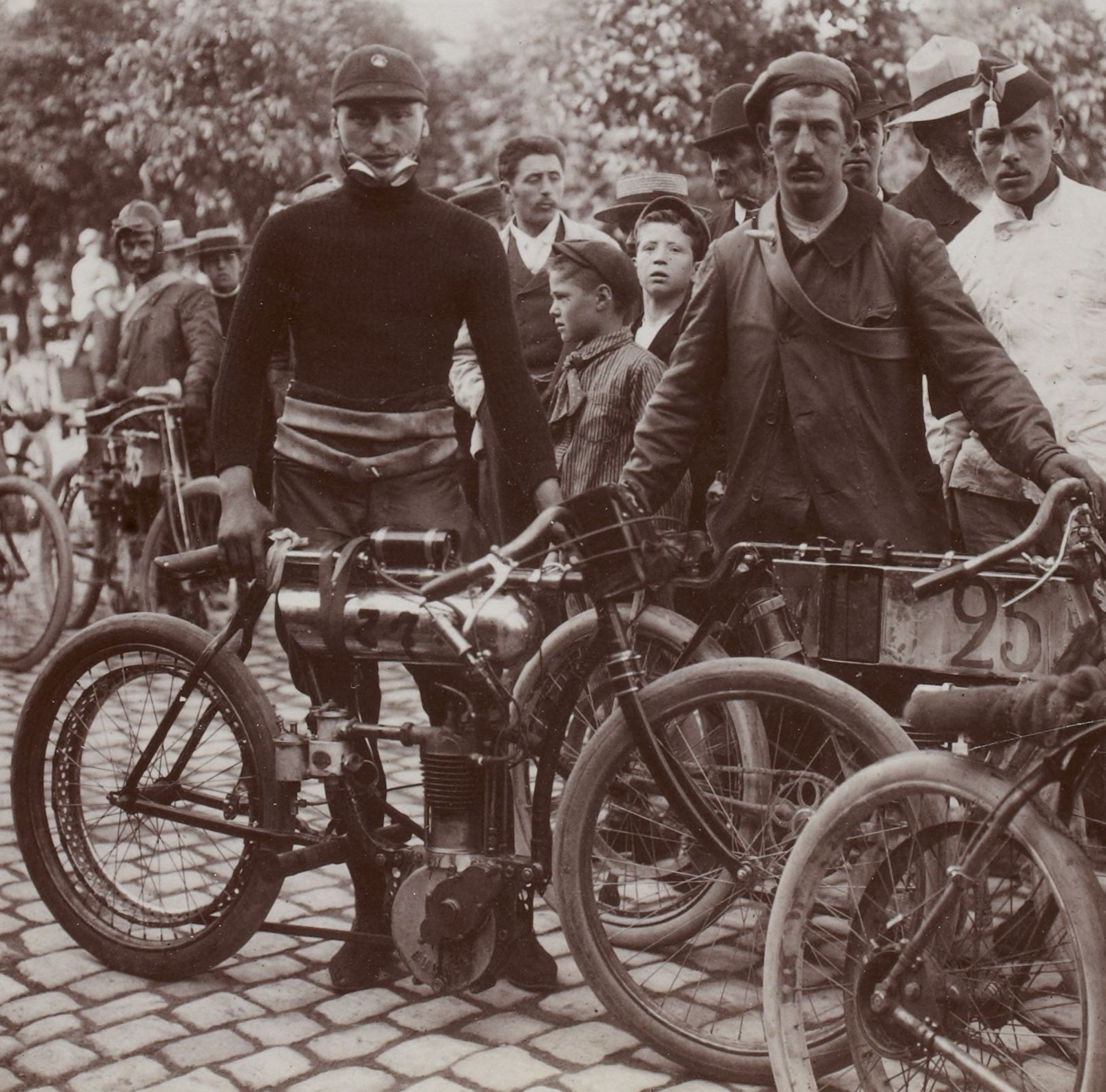 [Collection Jules Beau. Photographie sportive] : T. 27. AnnÃ©e 1904 / Jules Beau : F. 23v. Circuit des Ardennes, Arlon, 24 juillet 1904